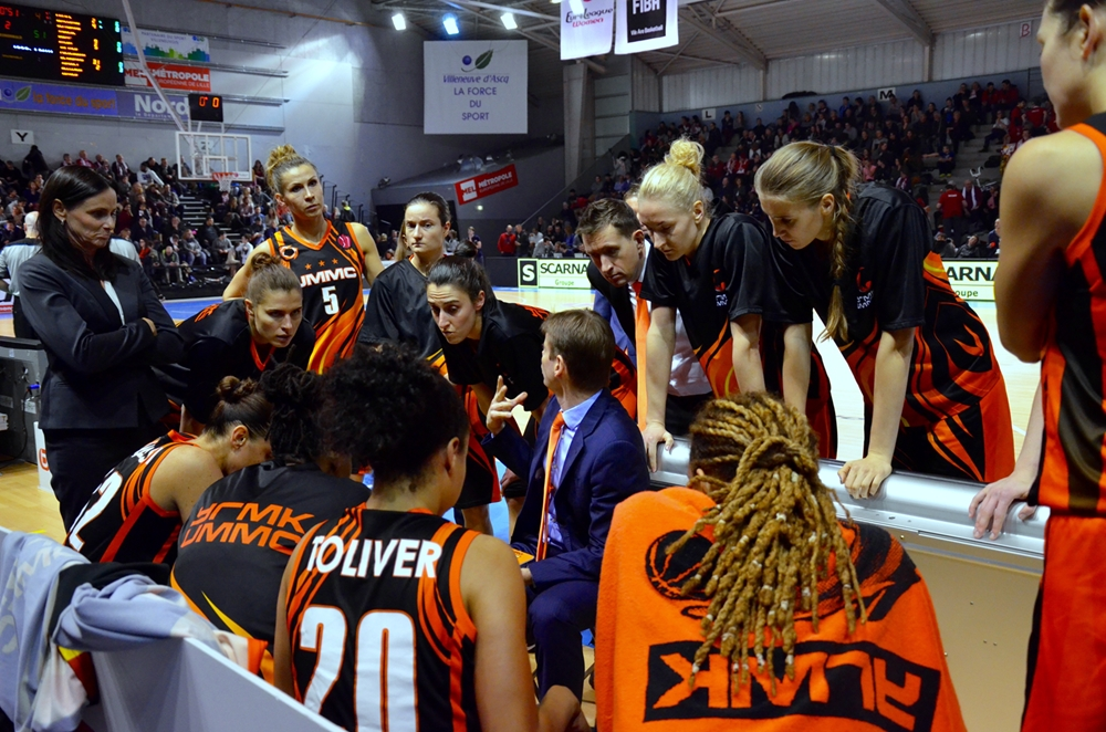 7 декабря 2016 года "Вильнёв-д'Аск" (Франция) - УГМК Екатеринбург (Россия) 69:88